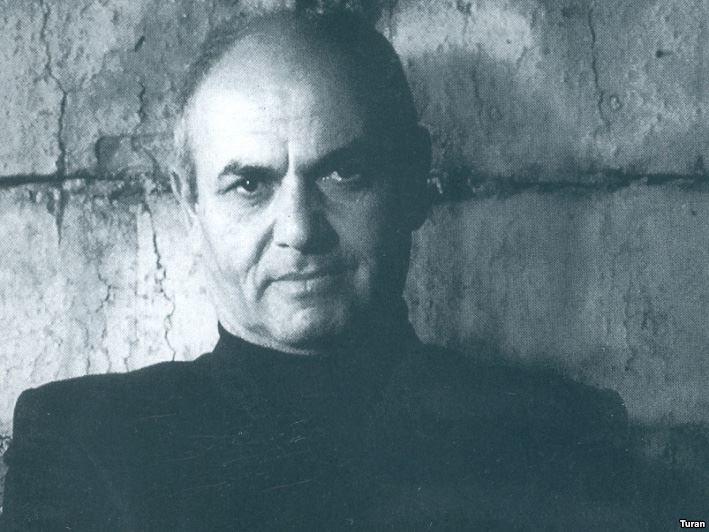 resim google'dan götürülmüş ve Turan haber ajansı tarafından alıntıdır.